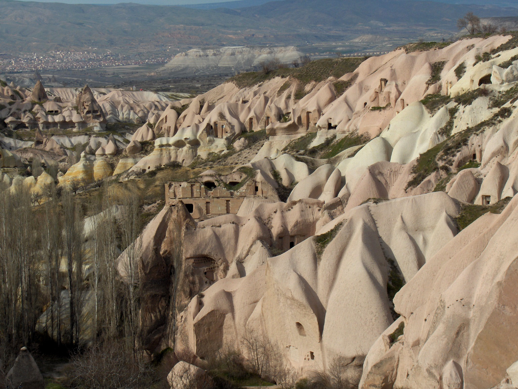 Duivenvallei, Uçhisar; Cappadocië, Turkeye